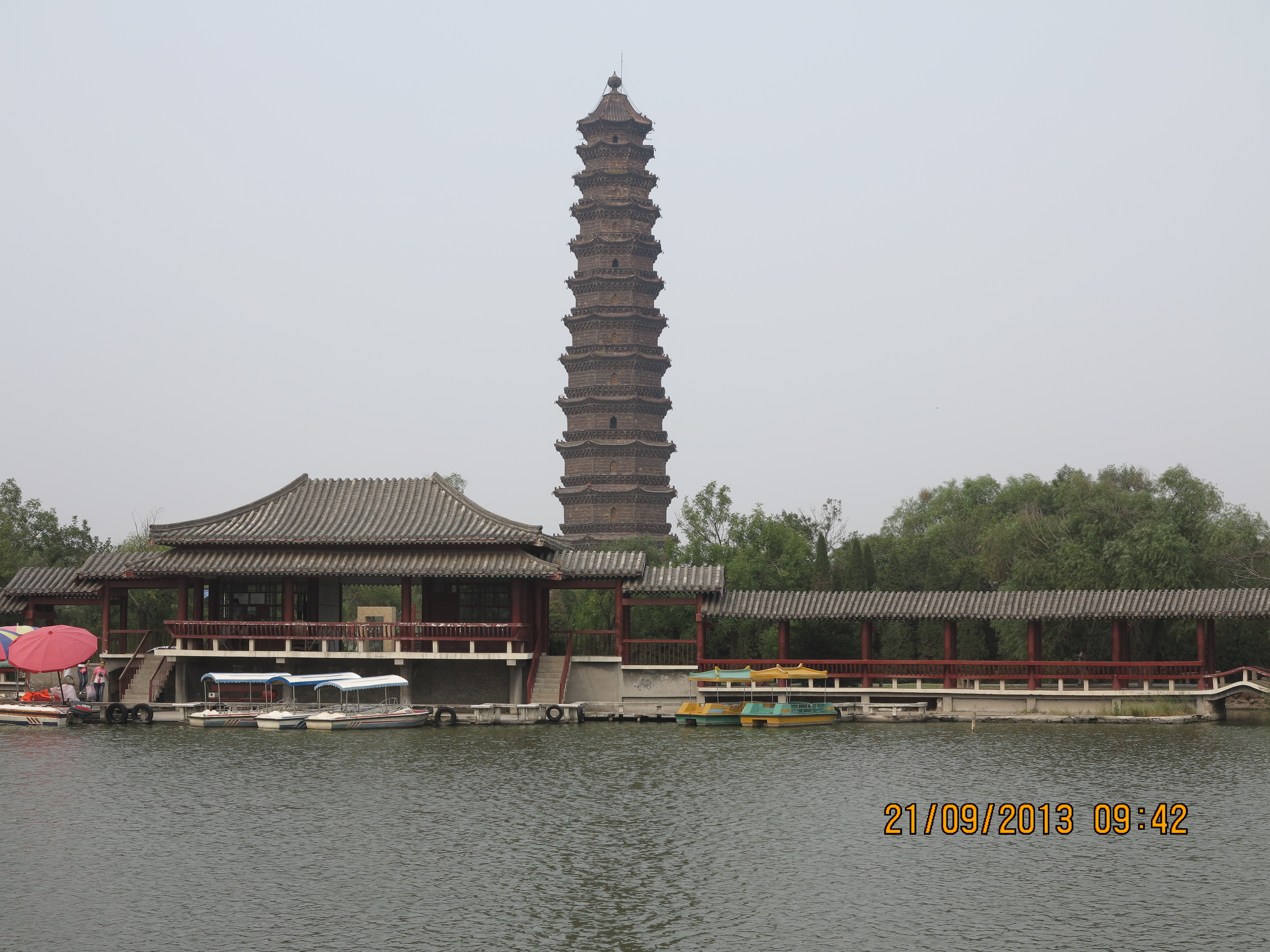 中文（中国大陆）: 河南开封铁塔